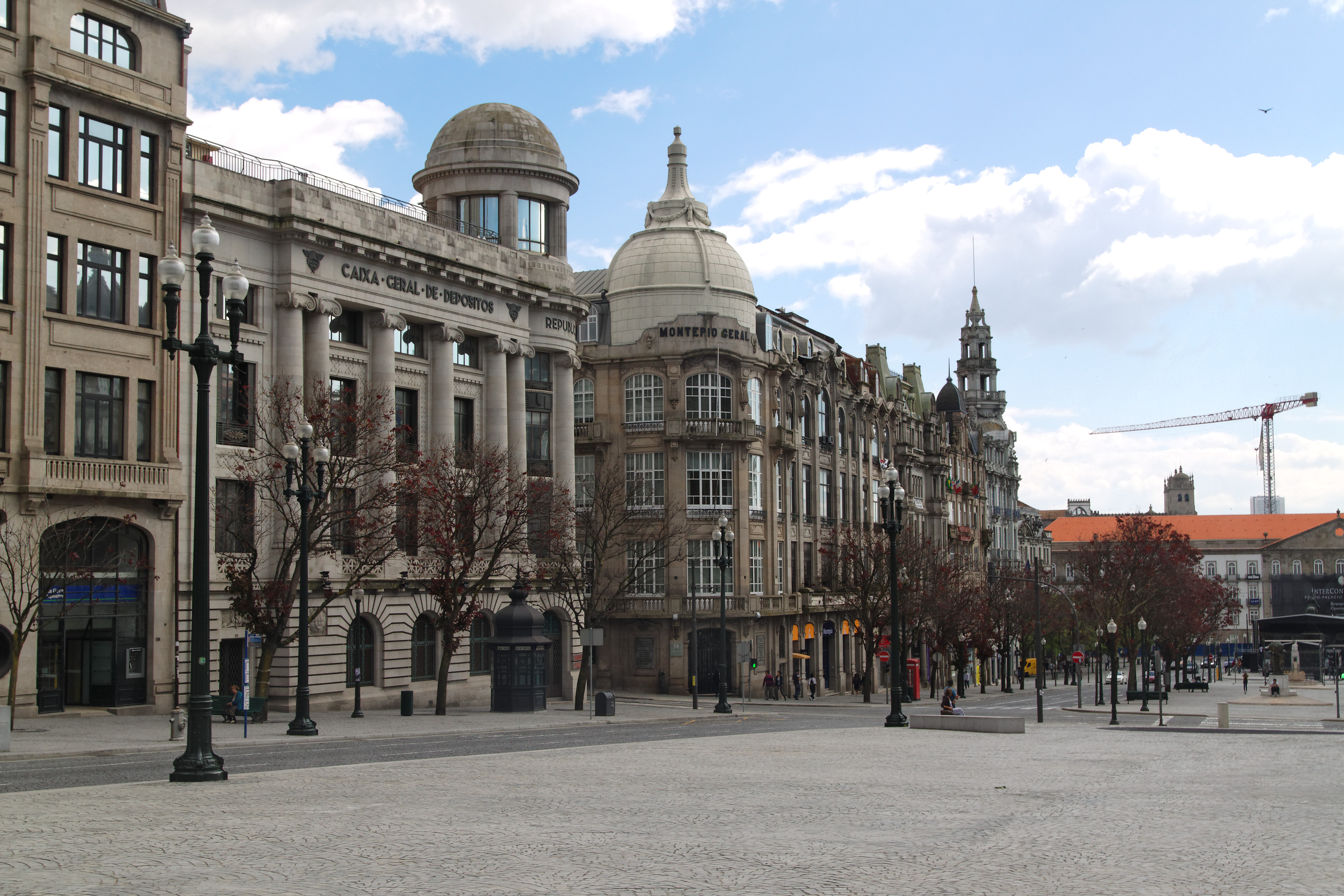 Edificios en Avenida de los Aliados, Porto.